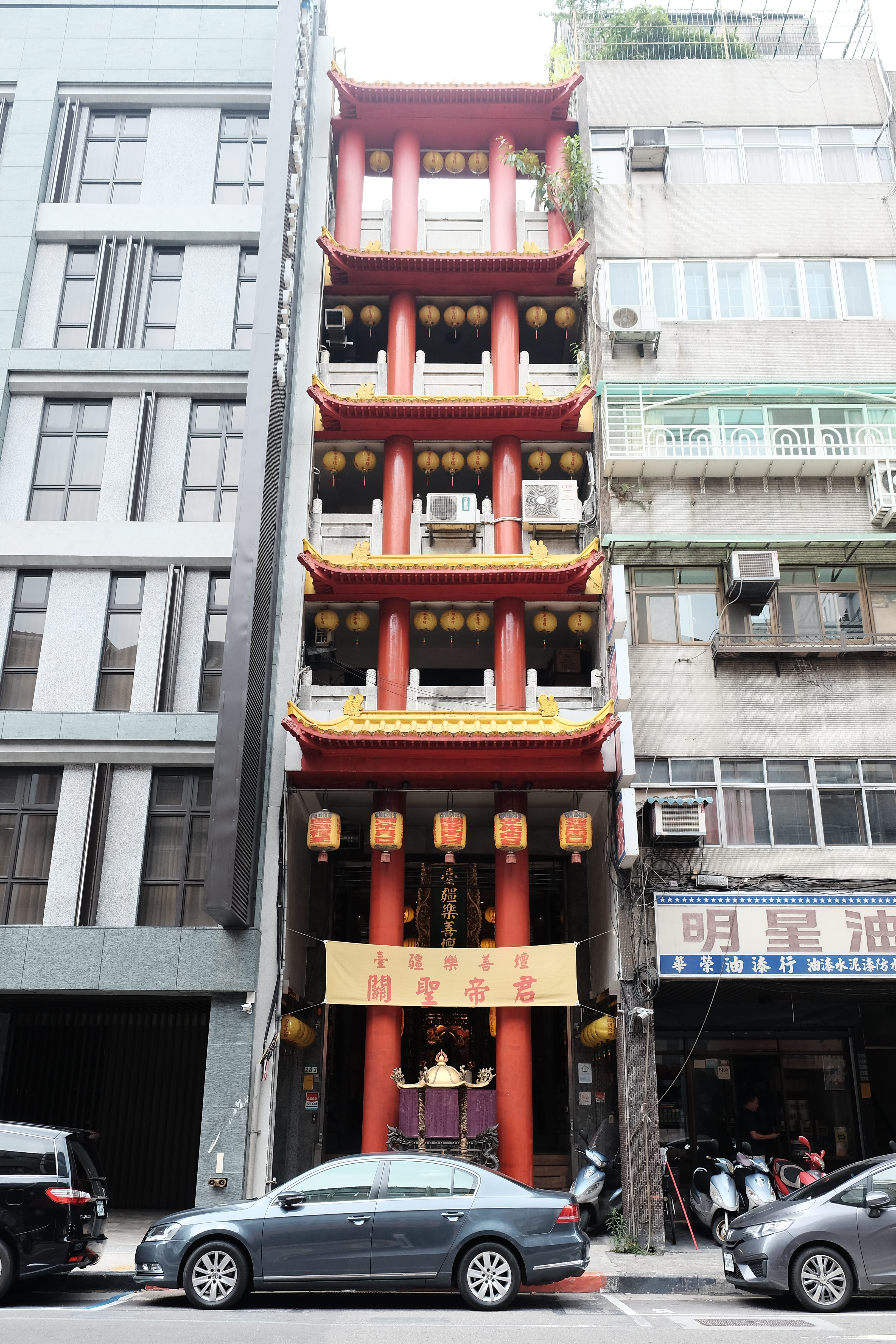 TaiJiangLeShan Temple 2018 台疆樂善壇建物 2018